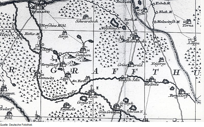 Original image description from the Deutsche Fotothek Senftenberg. Karte des Amtes Senftenberg, von Schenk, 1757 (Sign.: VII 105)